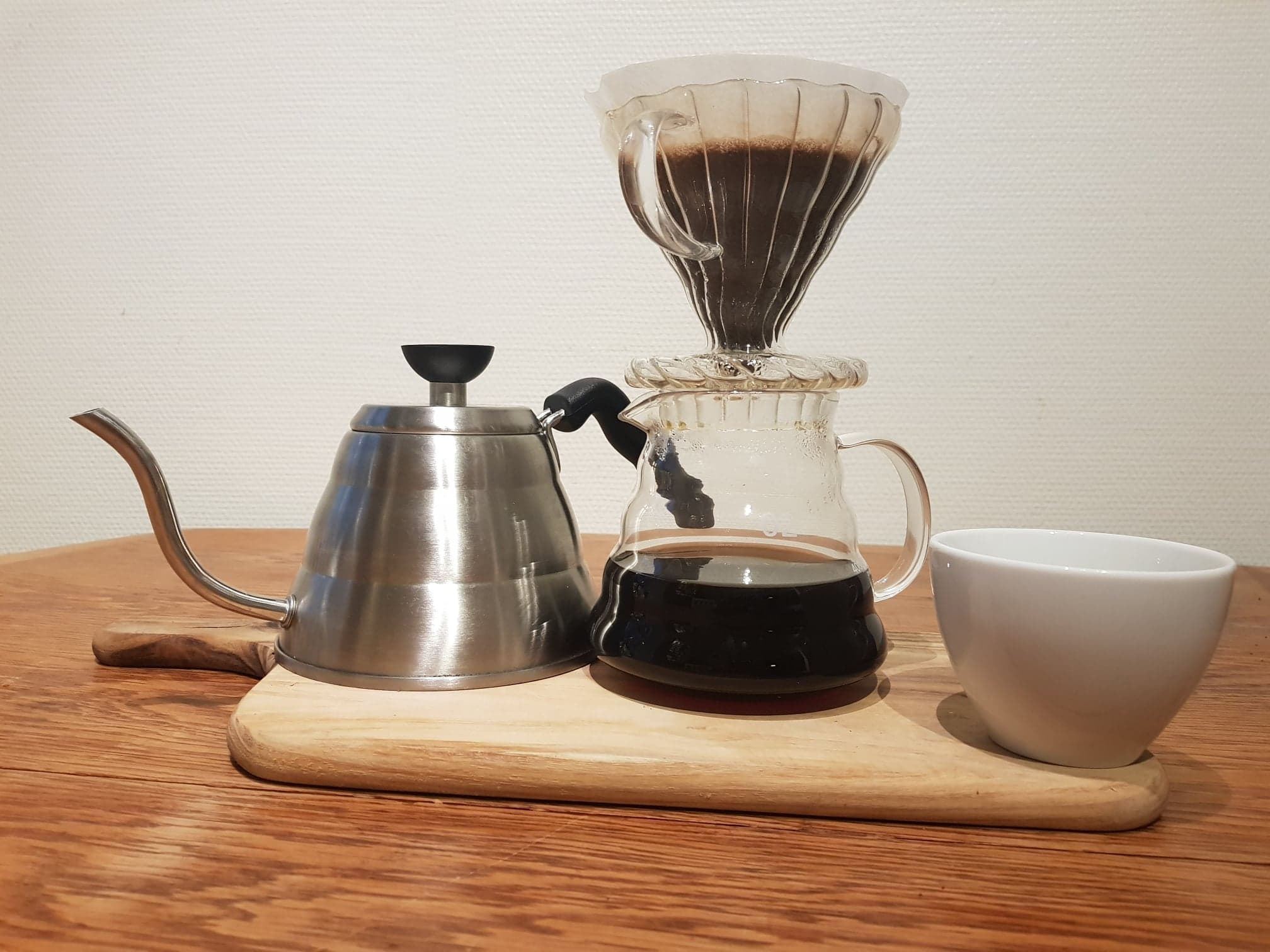 Eksempel på V60 håndbryggesett